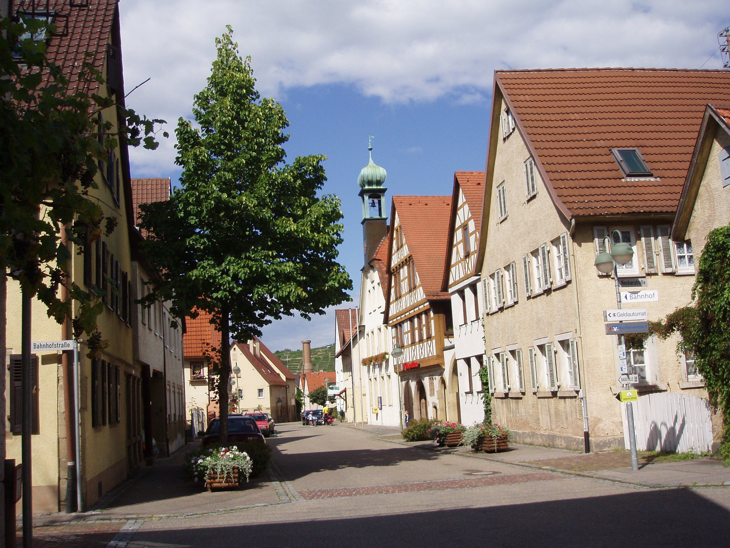 Straßenpartie in Walheim